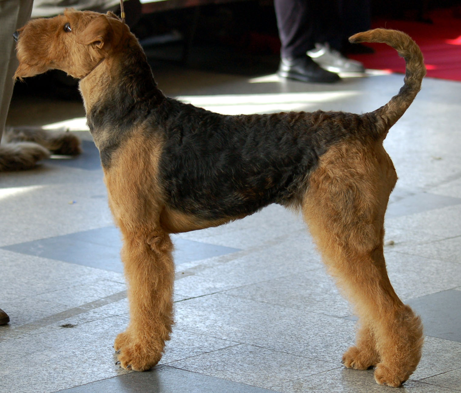 Airedale terrier